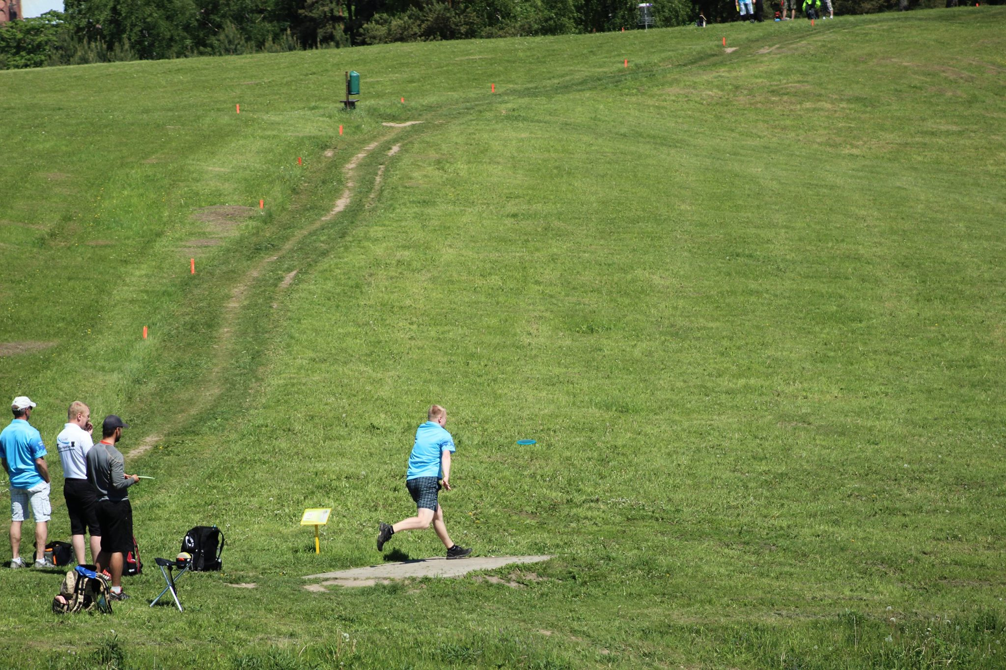 Mängija sooritamas avaviset tii alalt.